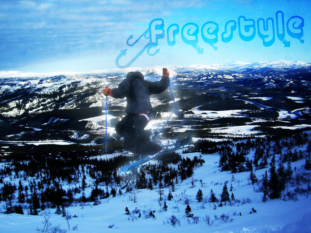 Grong